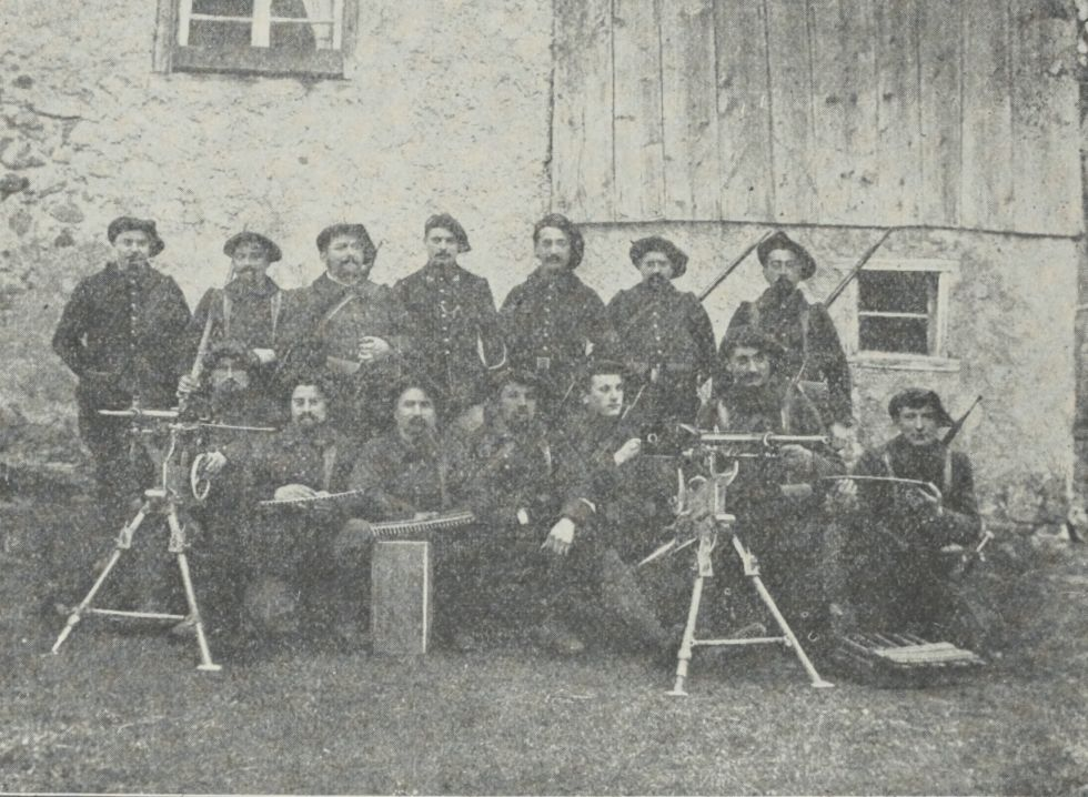 la section de mitrailleuses du bataillon au début de 1915